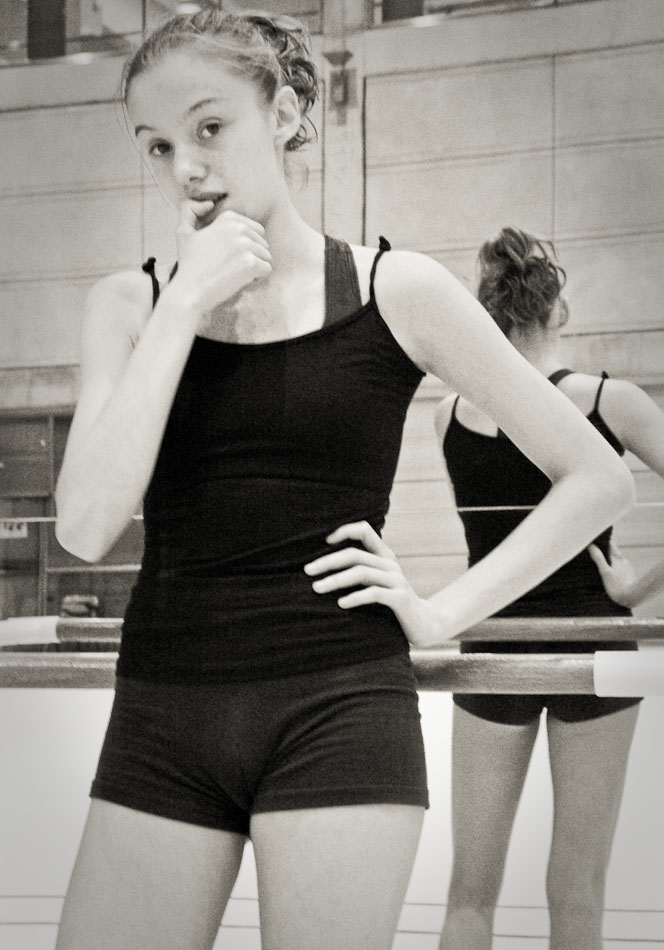 Sonia Abejón, como componente del conjunto nacional de gimnasia rítmica, durante un entrenamiento en el CAR de Madrid en diciembre de 2003.